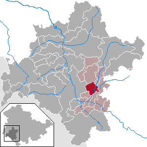 Rohr in Thuringia - District Schmalkalden-Meiningen